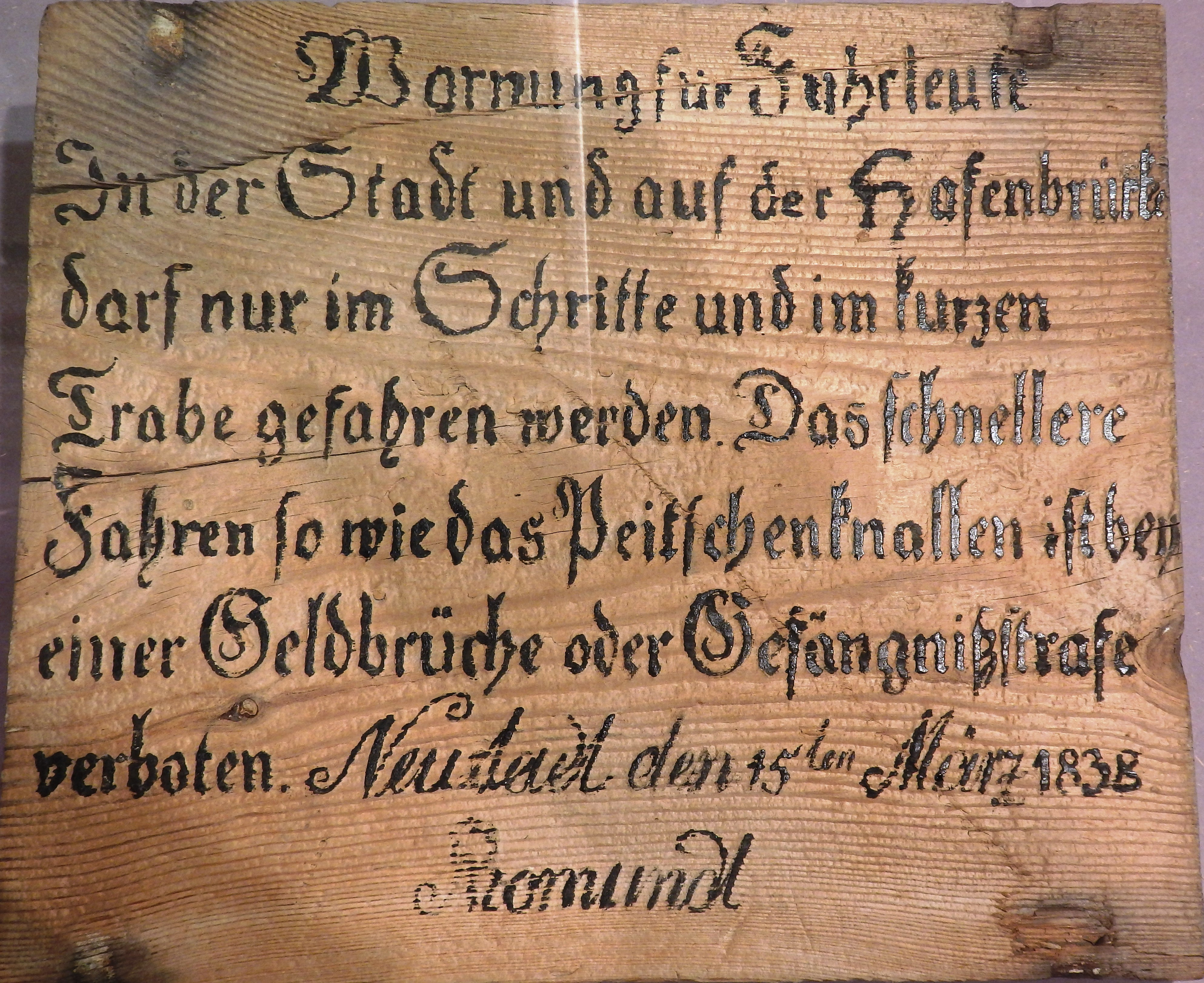 Geschwindigkeitsbegrenzung für Fuhrwerke auf Schrittgeschwindigkeit, Anordnung des Magistrats der Stadt Neustadt/Holstein 1838 auf Holztafel, Museum zeiTTor Neustadt/Holstein